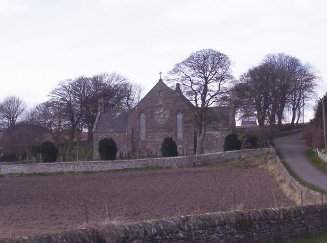 Carmyllie parish kirk